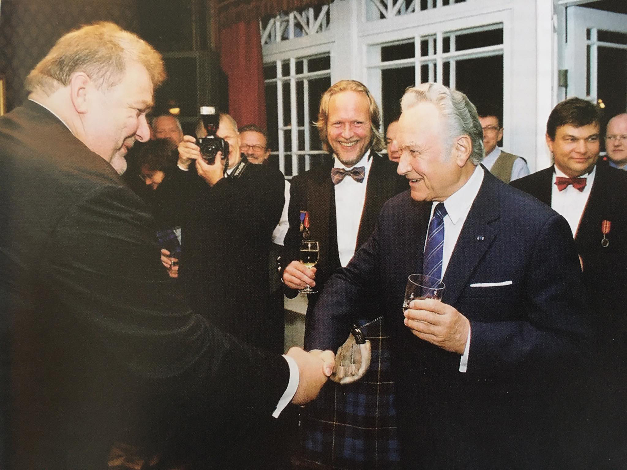 Šoti Klubi sünnipäev aastal 2003 - Margus Leivo ja Arnold Rüütel kätlemas